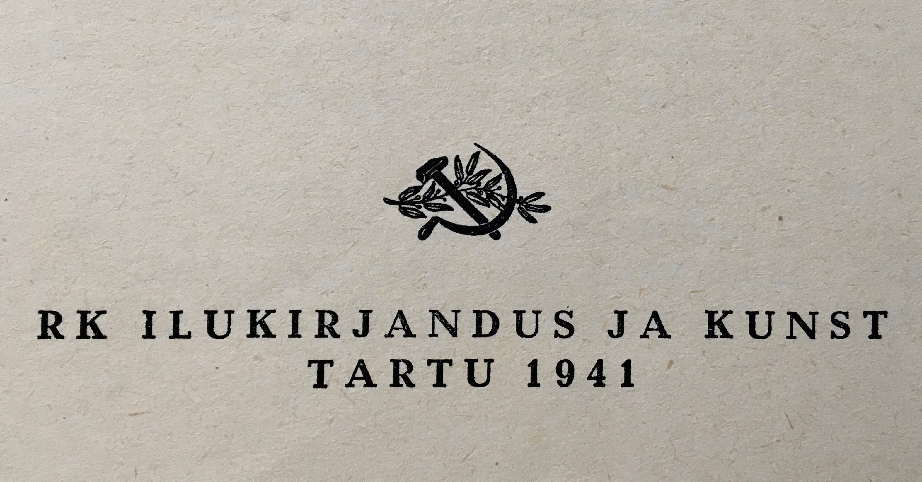 IK embleem raamatus